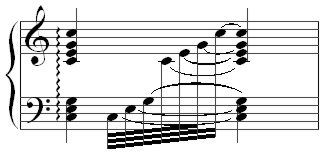 Notenbeispiel Arpeggio